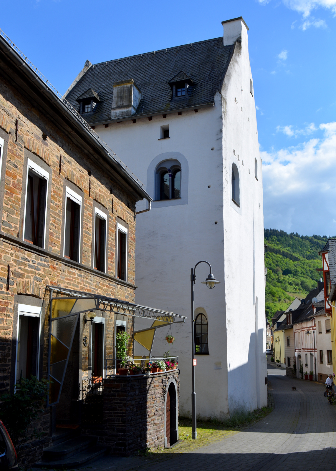 Romaanse woontoren aan de Vogtei te Senheim